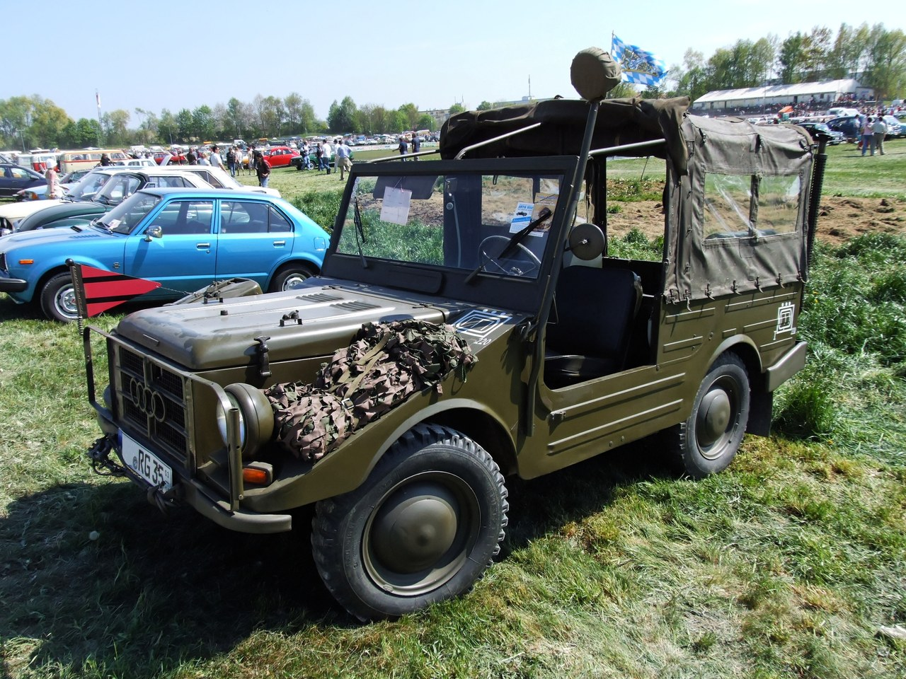 Quelle: selbst fotografiert, 04/2007 Fotograf: Späth Chr.